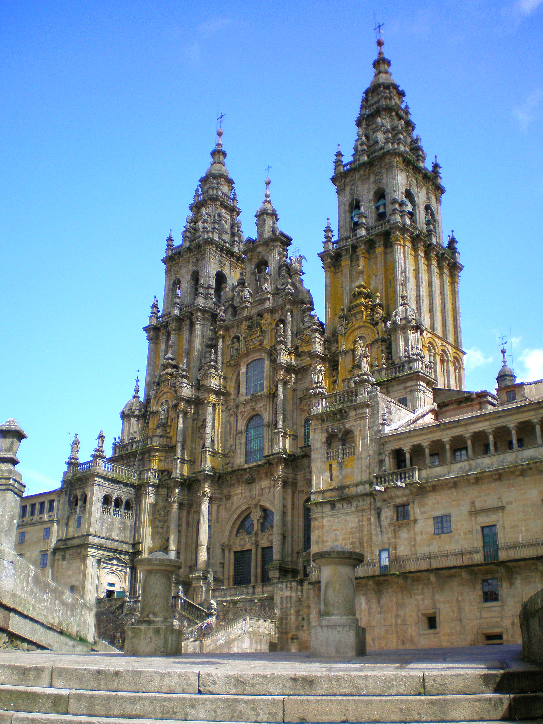 Catedral de Santiago de Compostela y Plaza del Obradoiro